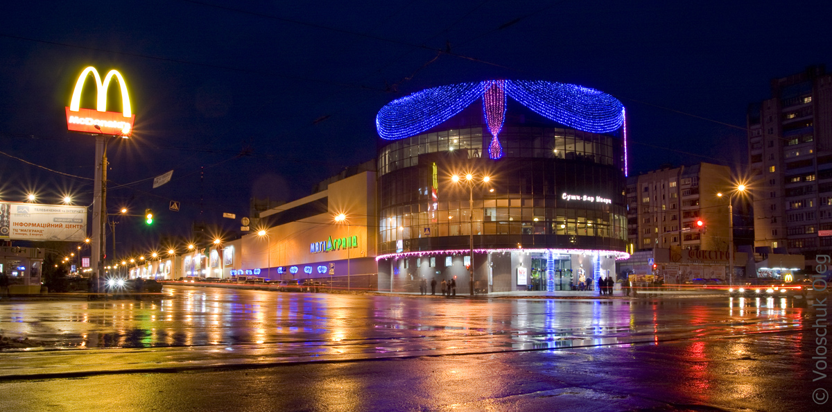 ТЦ "Магігранд"